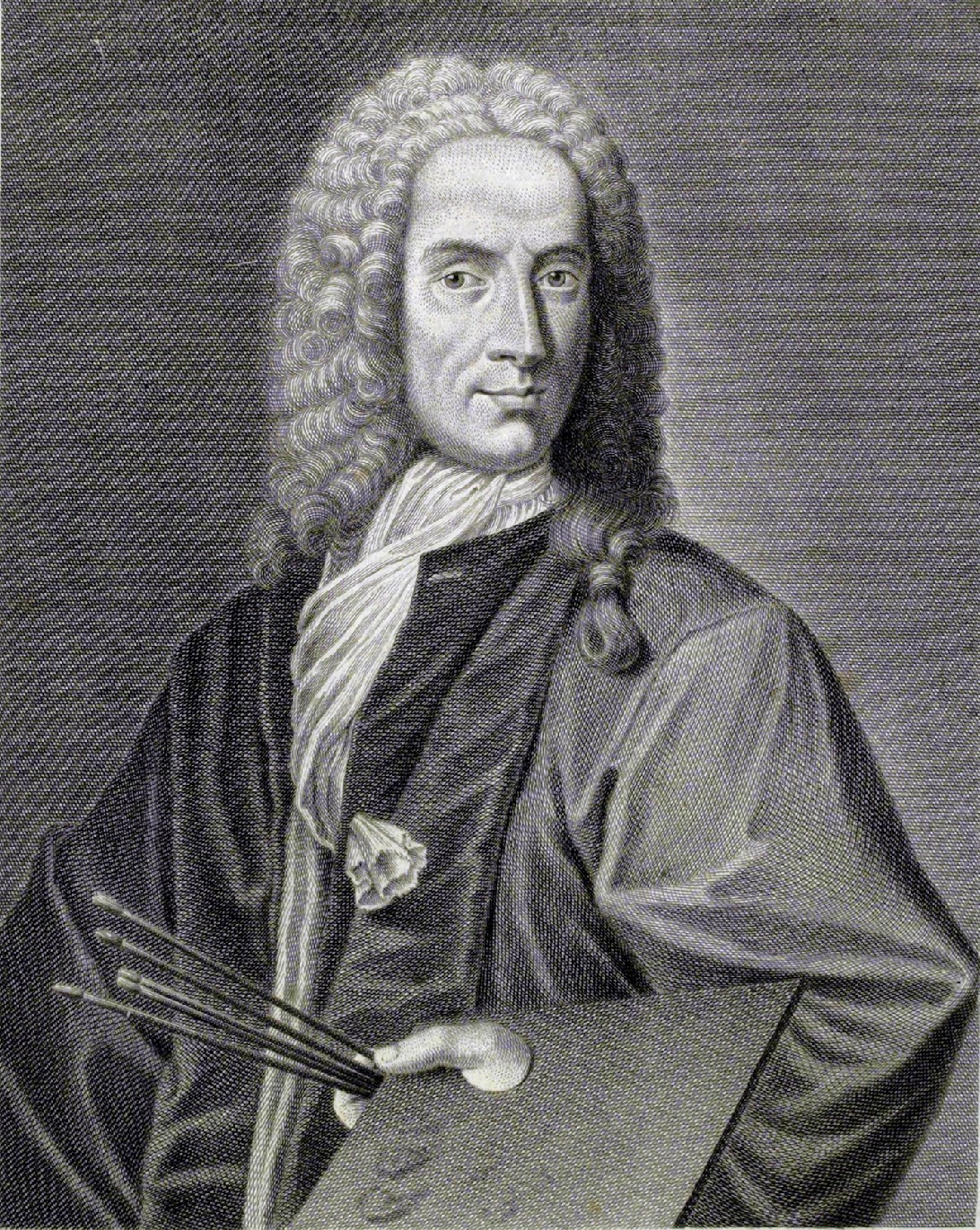 Painter Antonio Zanchi.